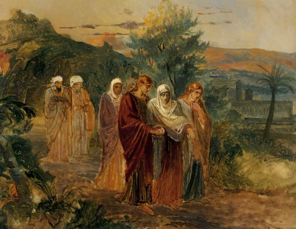 Ге Николай. Возвращение с погребения Христа. 1859